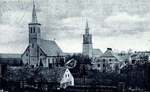 Pocztówka z Szybowic.